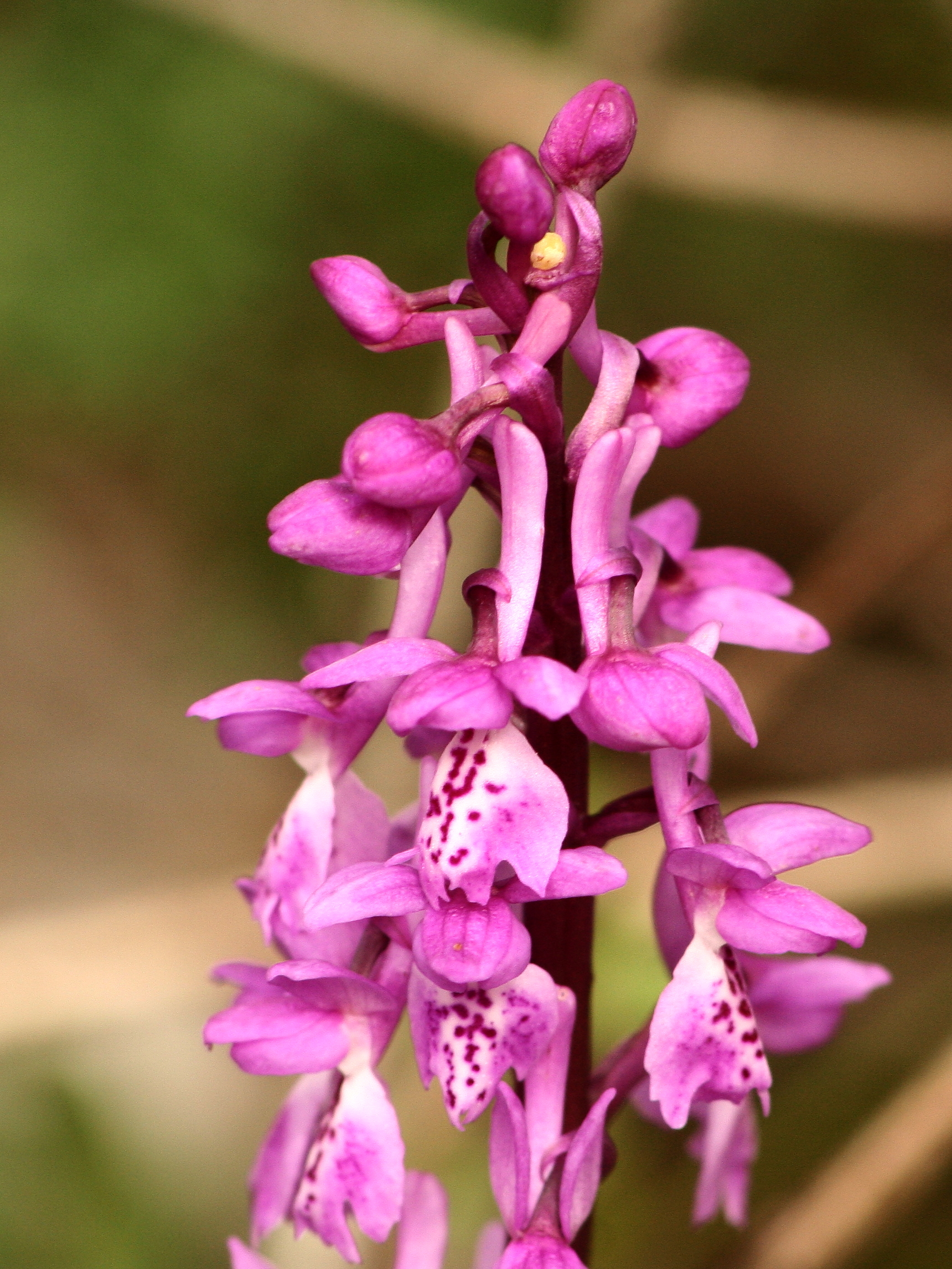 Orchis mascula Linnaeus Reino Plantae Filo Magnoliophyta Classe Liliopsida Ordem Asparagales Família Orchidaceae Género Orchis Nome Comum satirião-macho, escroto-canino, pata-de-lobo, salepeira-maior, salepo-maior